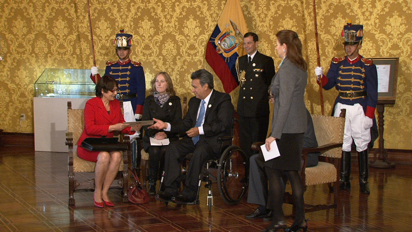 Slovenska veleposlanica v Braziliji, Milena Šmit, izroča poverilno pismo podpredsedniku Ekvadorja Leninu Moreni.